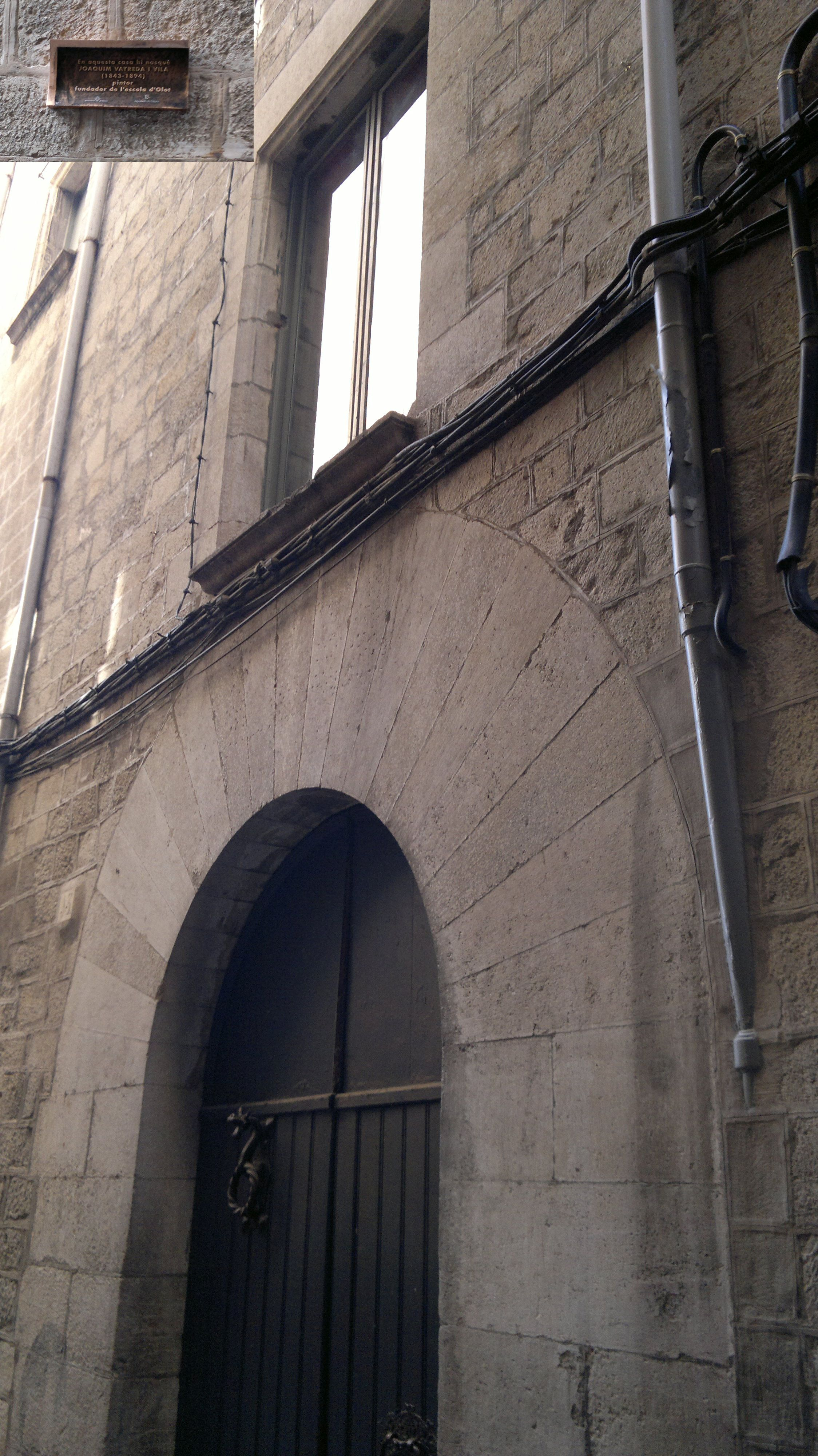 Casa natal de Joaquim Vayreda al carrer de la Força, 15. Girona (Catalunya)